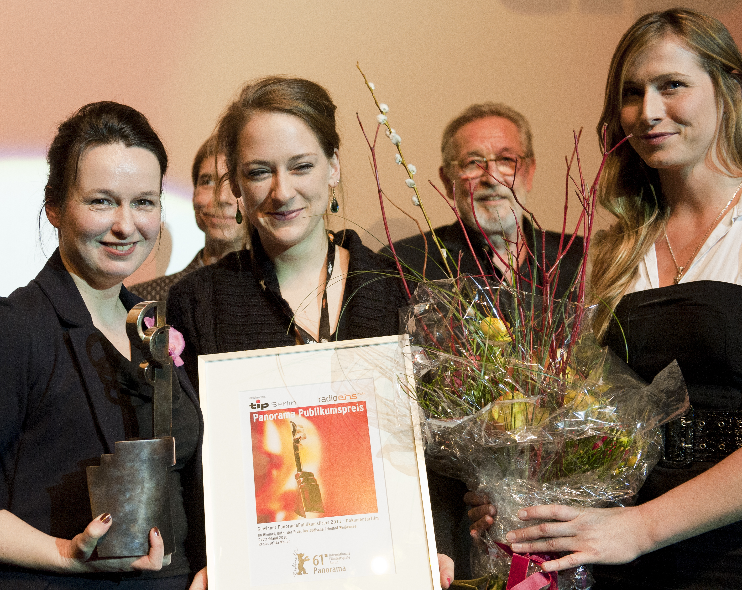 Die Crew des ausgezeichneten Dokumentarfilms 2011, "Im Himmel, Unter der Erde. Der Jüdische Friedhof Weißensee", hält den Panorama PublikumsPreis in den Händen.